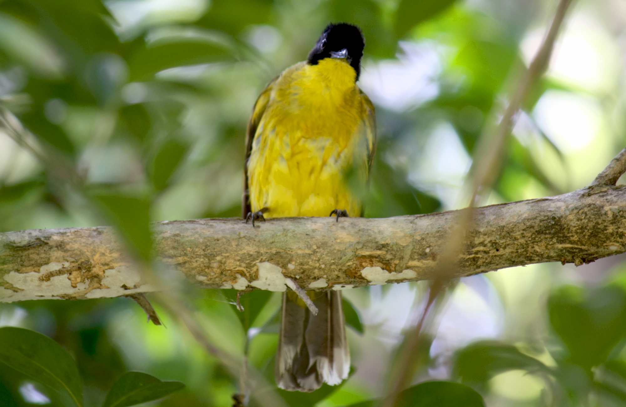 கருப்புத் தலை சின்னான் - தமிழ்நாட்டில்/ இலங்கையில் காணப்படும் பறவைகள்